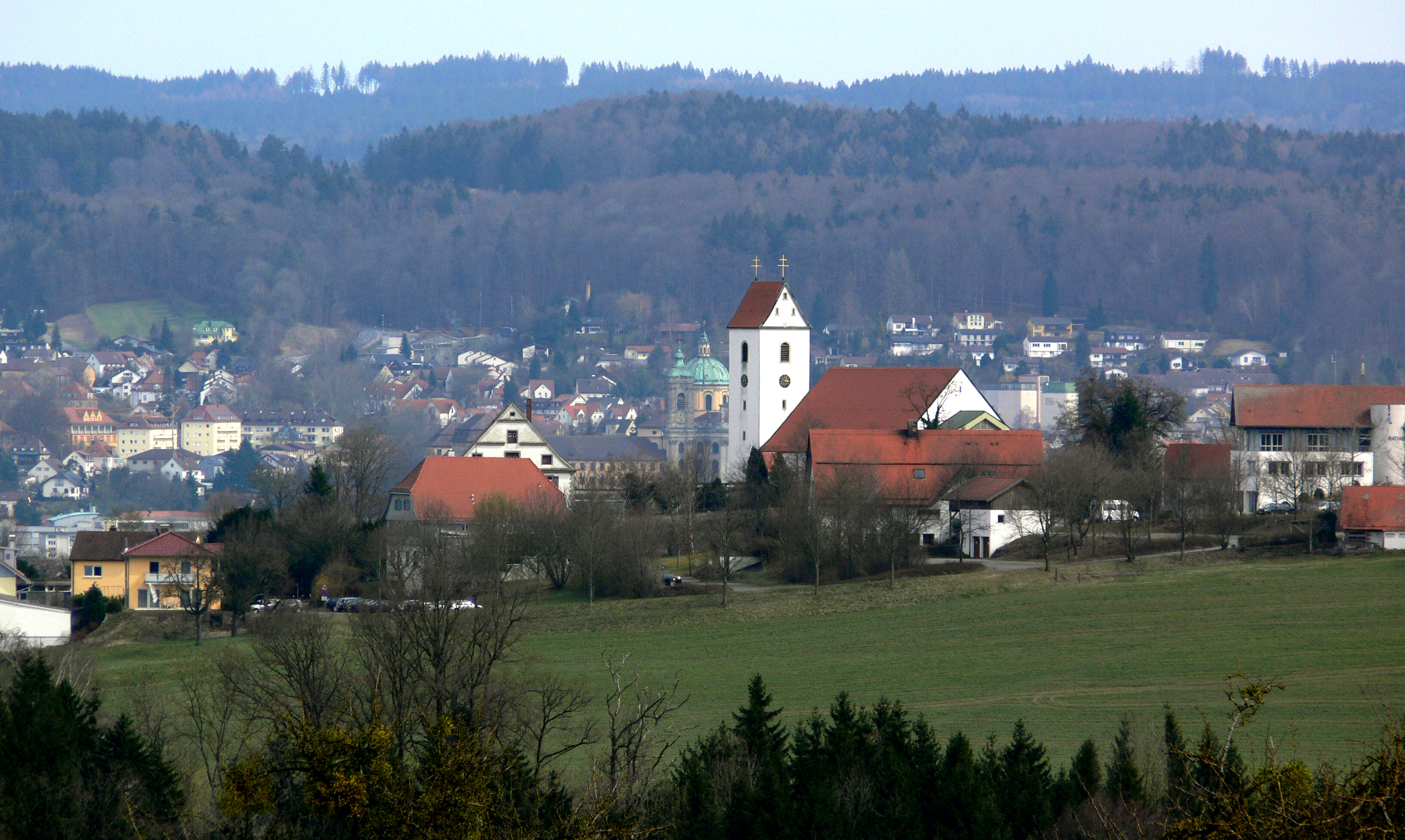 Ortsteil Berg (mit Pfarrkirche) in 88276 Berg, gesehen von den Anhöhen im Westen, im Hintergrund die Basilika Weingarten im Schussental